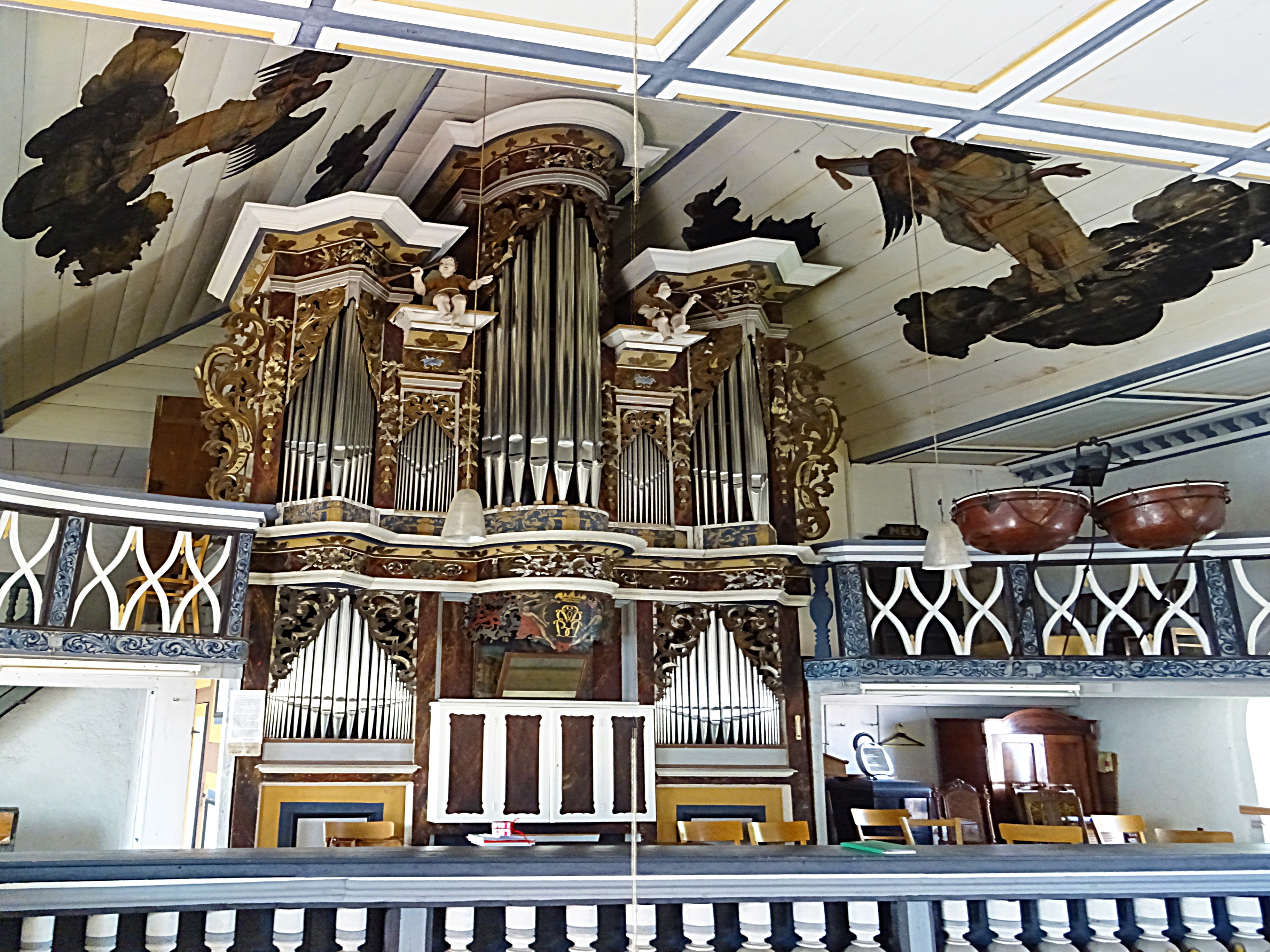 Krippendorff-Orgel in der St. Bonifatiuskirche Sömmerda. 1703-09 J. G. Krippendorff (Kölleda), Neubau unter Verwendung älterer Teile. 1869 lieferte Carl Daniel aus Walschleben Pläne für eine Orgel in St. Bonifatius (Sömmerda). Durch seinen frühen Tod kam es nicht mehr zur Ausführung. Nach dessen Plänen 1871 Reparatur und Umbau durch L. Witzmann (Kleinrudestedt). 1935 und 1950/51 Umdisponierung und Reparatur durch G. Kirchner (Weimar). 2007/08 Restaurierung und 2014 Neubau der Prospektpfeifen durch Orgelbau Waltershausen.[1][2]